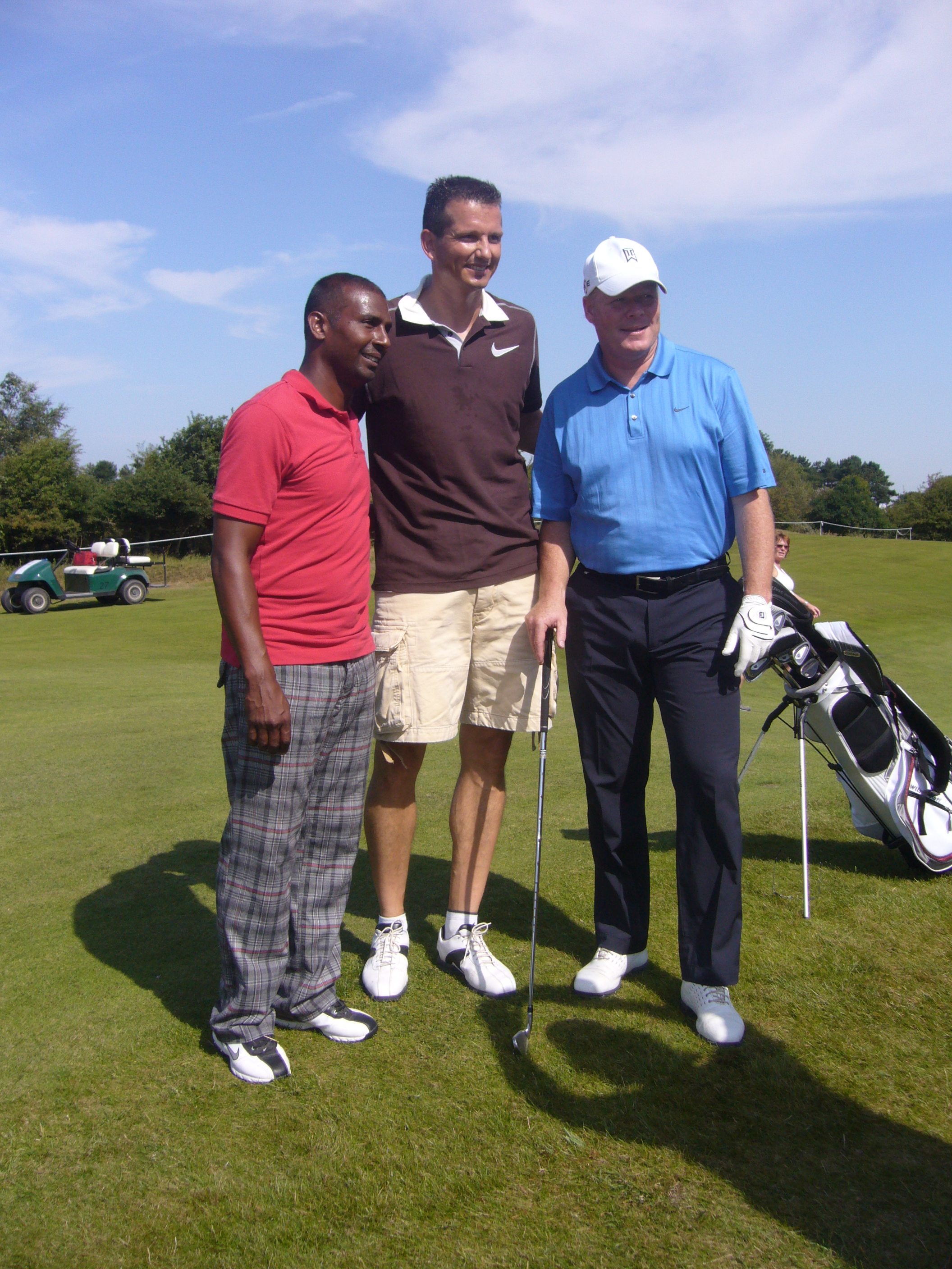 KLM Open, Pro-Am op de Kennemer: Team met Aron Winter, Richard Krajicek en Ronald Koeman